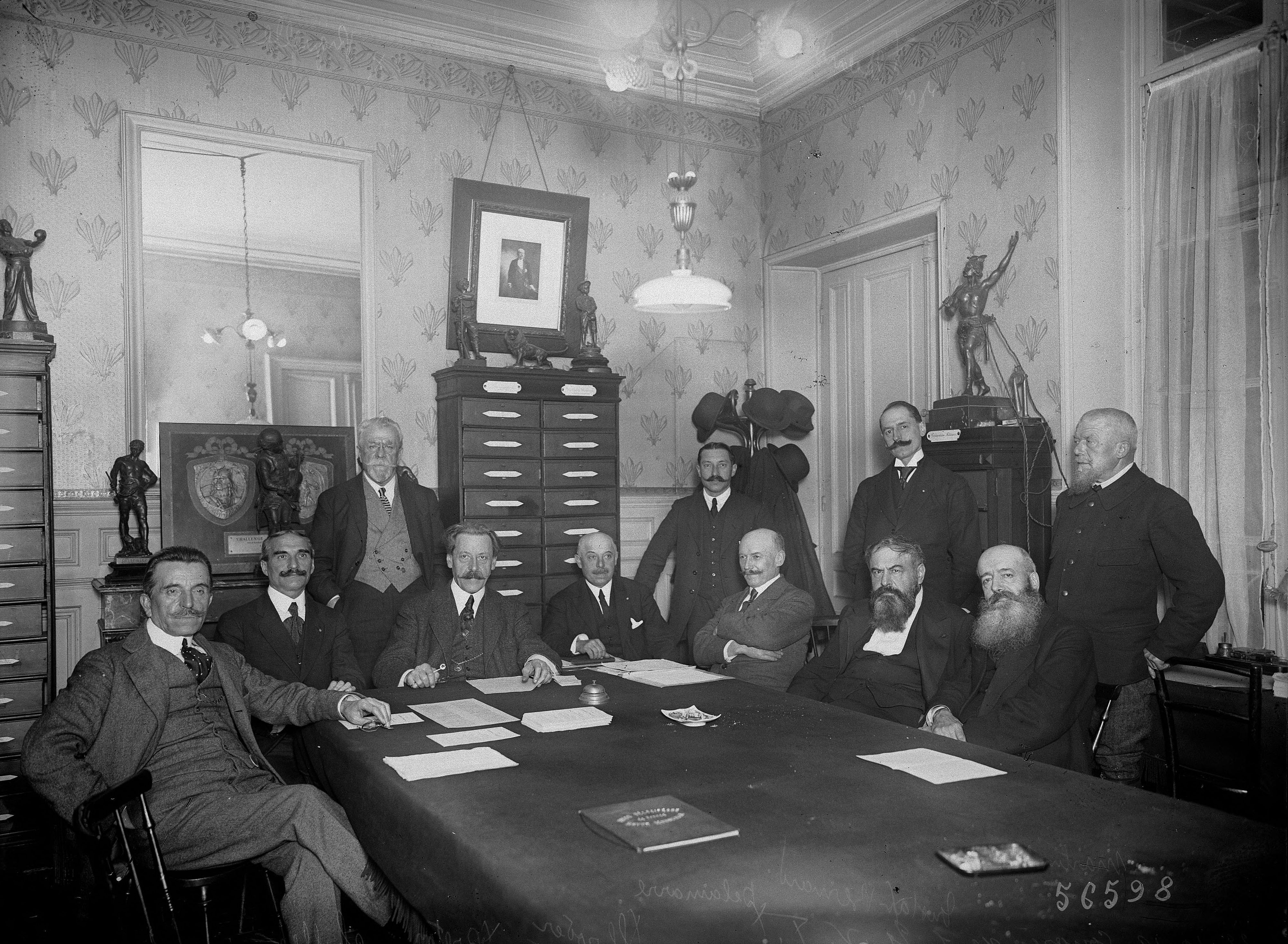 congrès de l'U.V.F.[Union vélocipédique de France, debout, de gauche à droite, Alfred Riguelle, René Mathis, Van Steenbrugghe, Georges Duchesne, et assis, Louis Josset, Georges Chollet, Léon Breton, Schrader, Ernest Delamarre, Tristan Bernard, Claude Martin